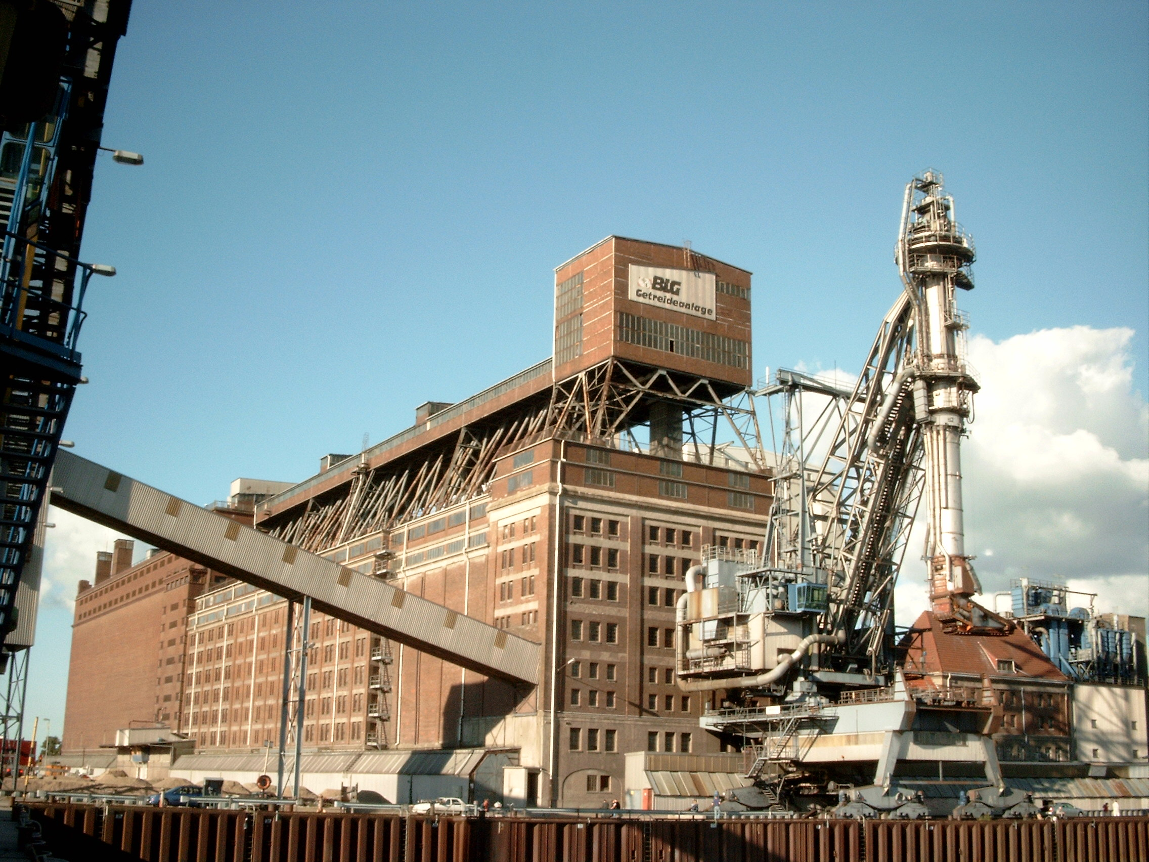 Die Getreideanlage im Bremer Hafen Das abgebildete Objekt ist ein geschütztes Kulturdenkmal in der Freien Hansestadt Bremen, mit der Nr. 1748 beim Landesamt für Denkmalpflege registriert.